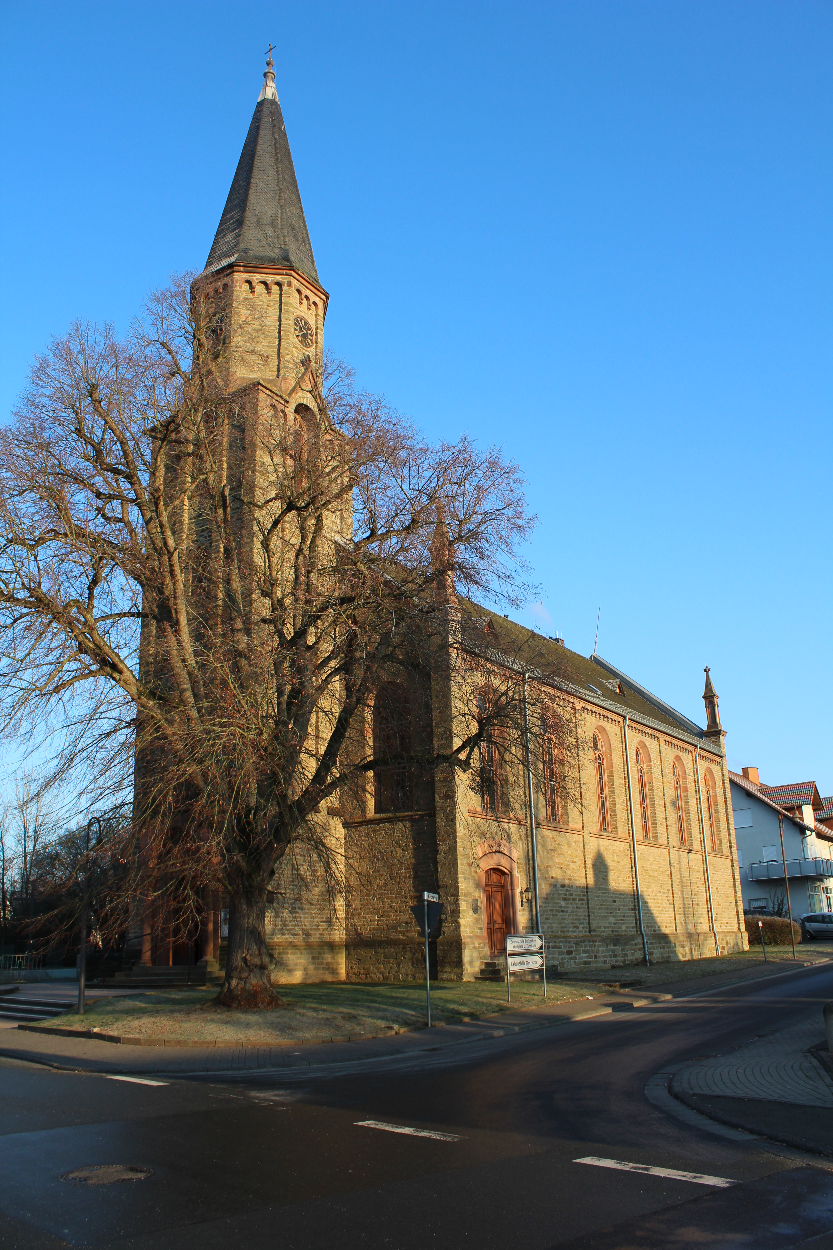 Evangelische Kirche Biskirchen, Gemeinde Leun, Lahn-Dill-Kreis, Hessen, Deutschland